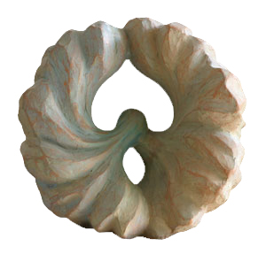 A Búvópatak-díj érméje, amit a díjazottak kaptak 2010-ig